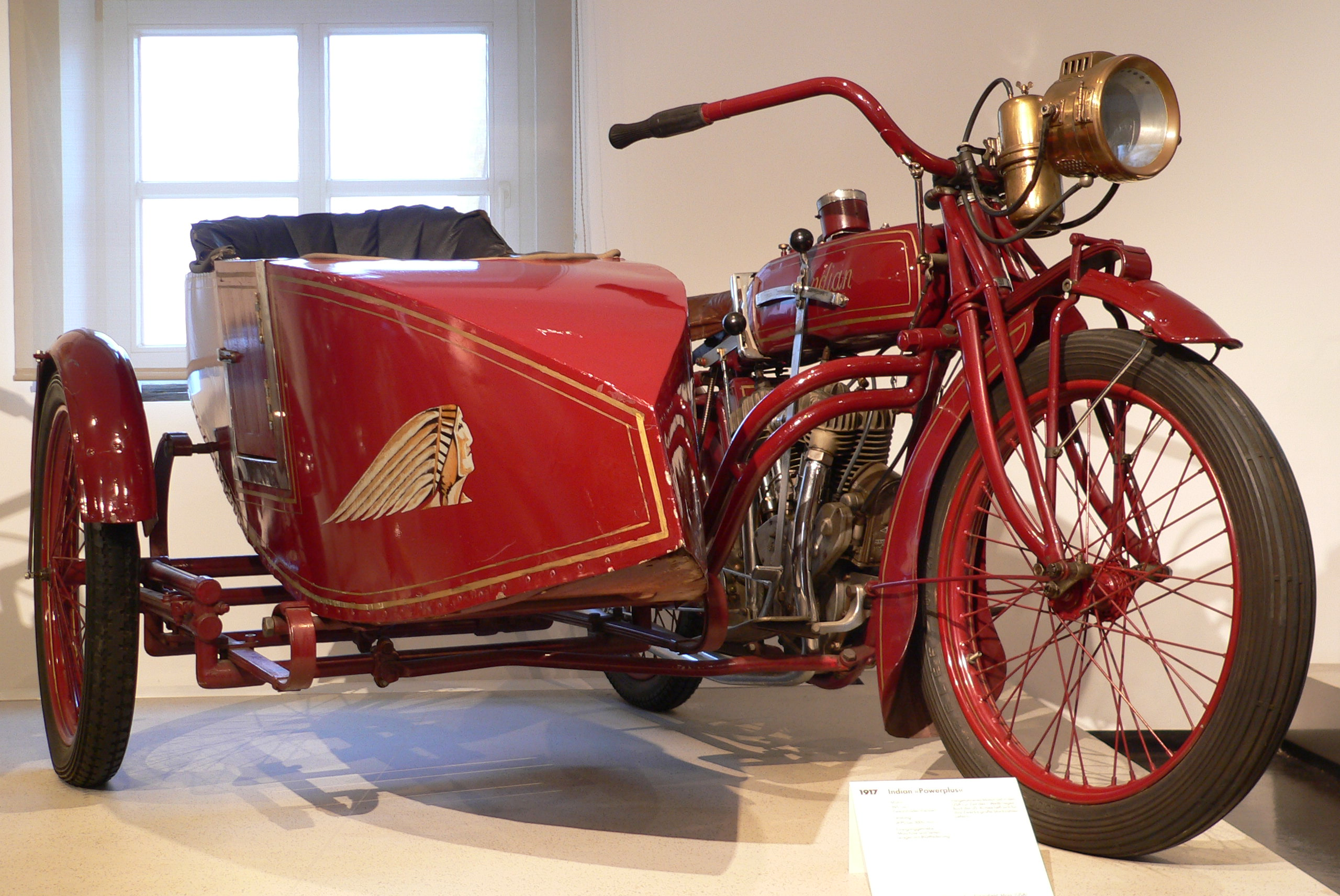 Motorbike "Indian Powerplus" (1917) at the Deutsches Zweirad- und NSU-Museum